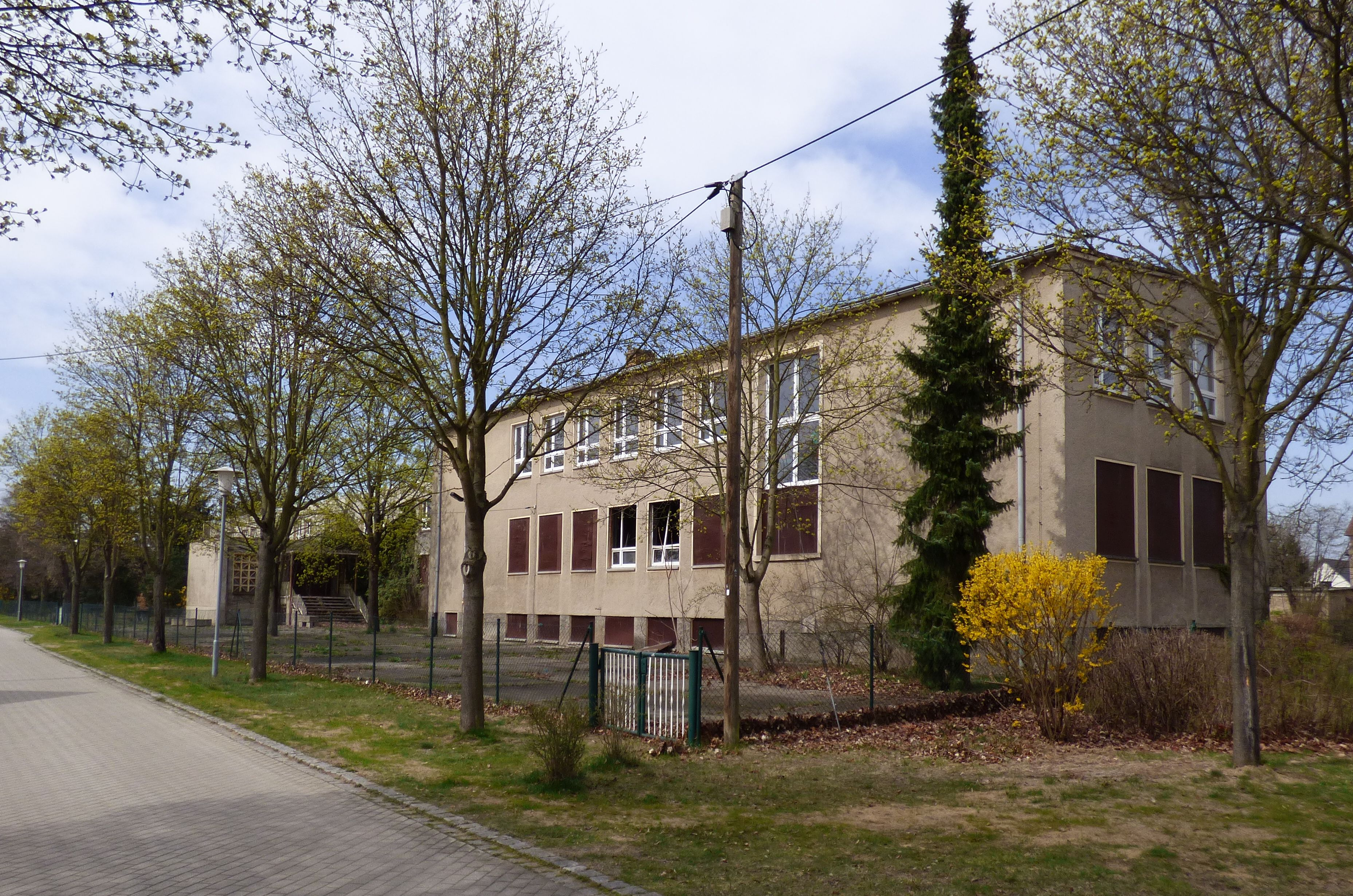 Alte Schule Zobersdorf